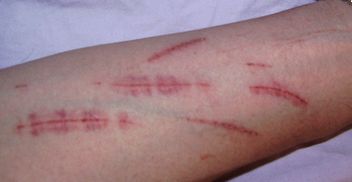 Selbstverletzung (Ritze/Schnittwunden) am Arm.